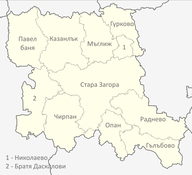 Картата е създадена от Любомир Таушанов